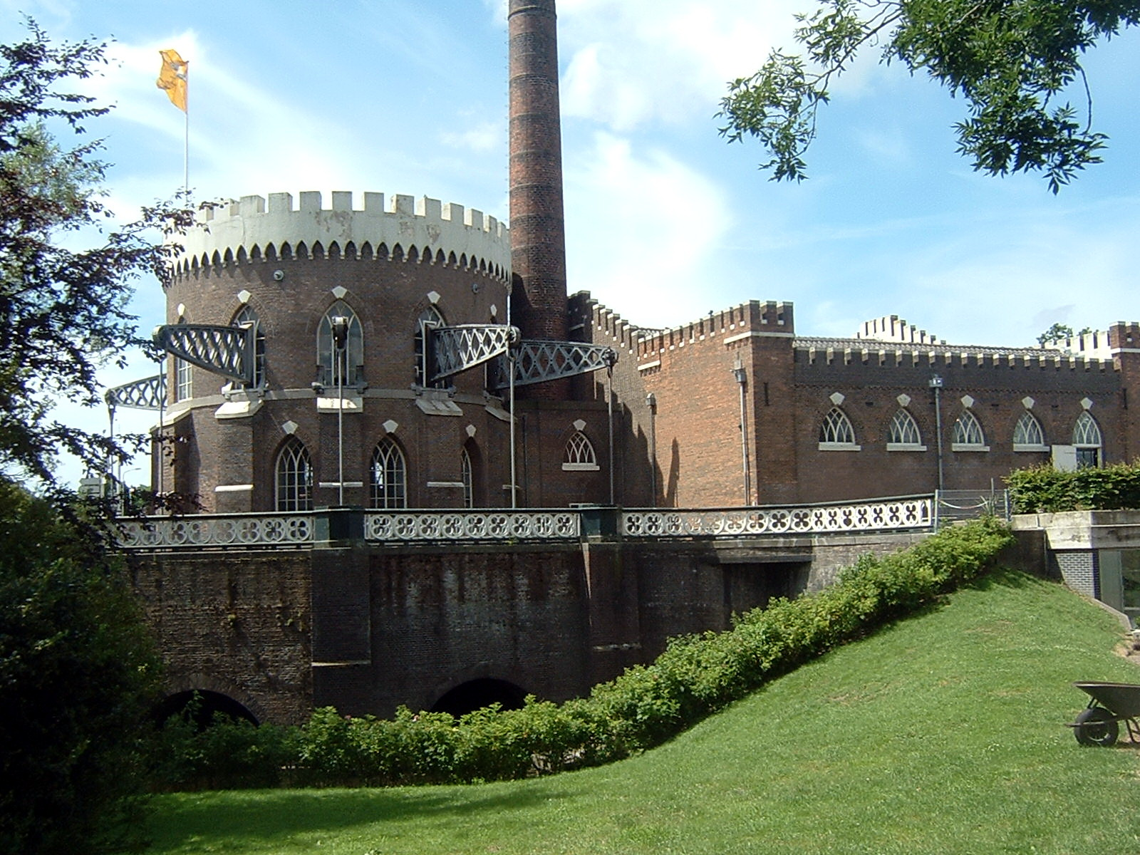 De Cruquius